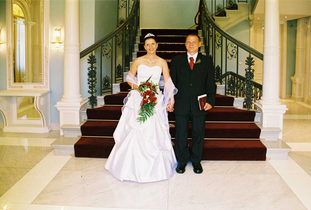 Hochzeit